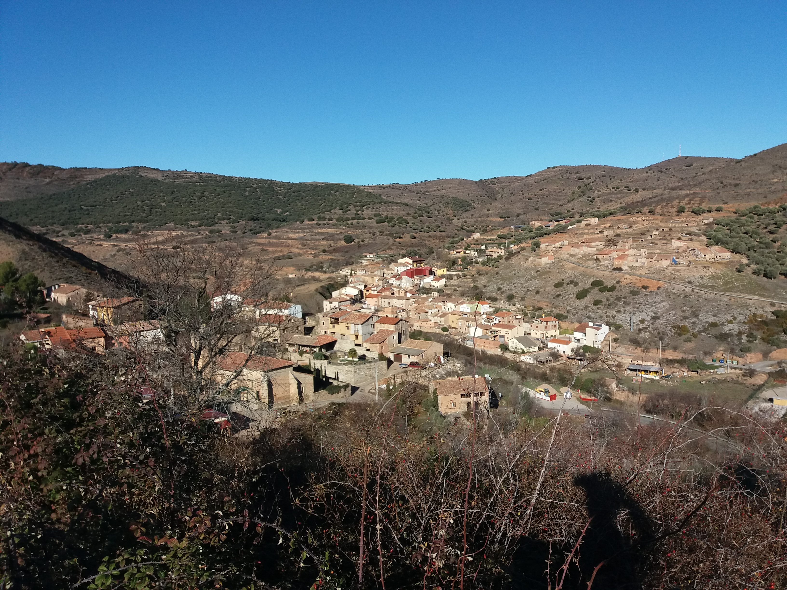 San Bartolomé de Jubera con Santa Engracia al fondo